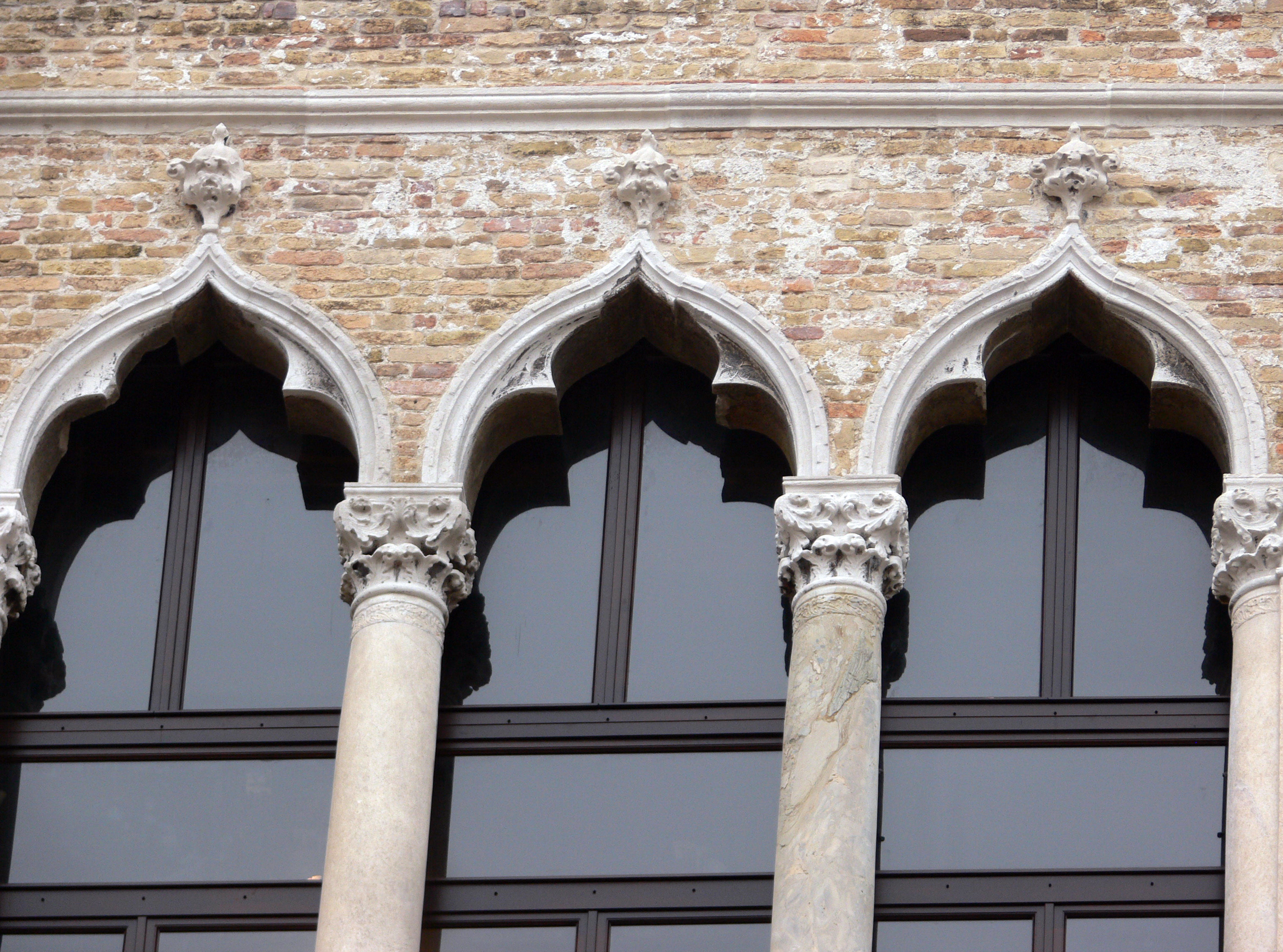 Palazzo Fortuny, à Venise